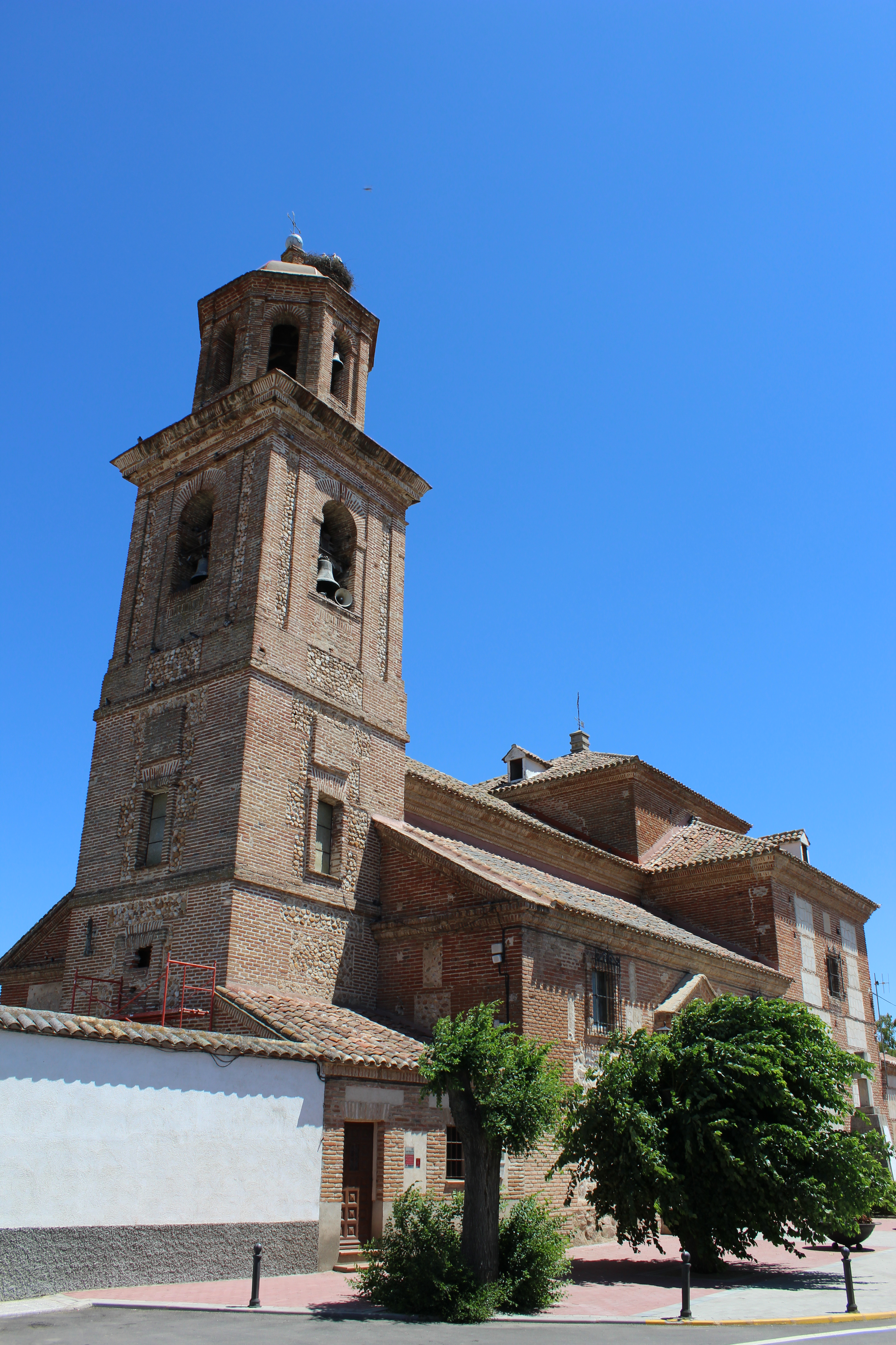 Iglesia de San Esteban Protomártir, Los Cerralbos, Toledo.